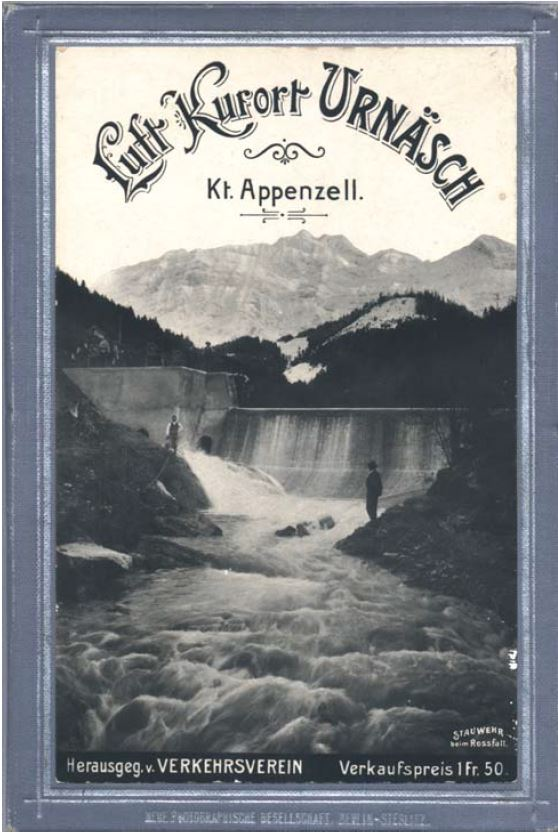 Luft Kurort Urnäsch, Stauwehr 1904, Urnäsch AR, Schweiz